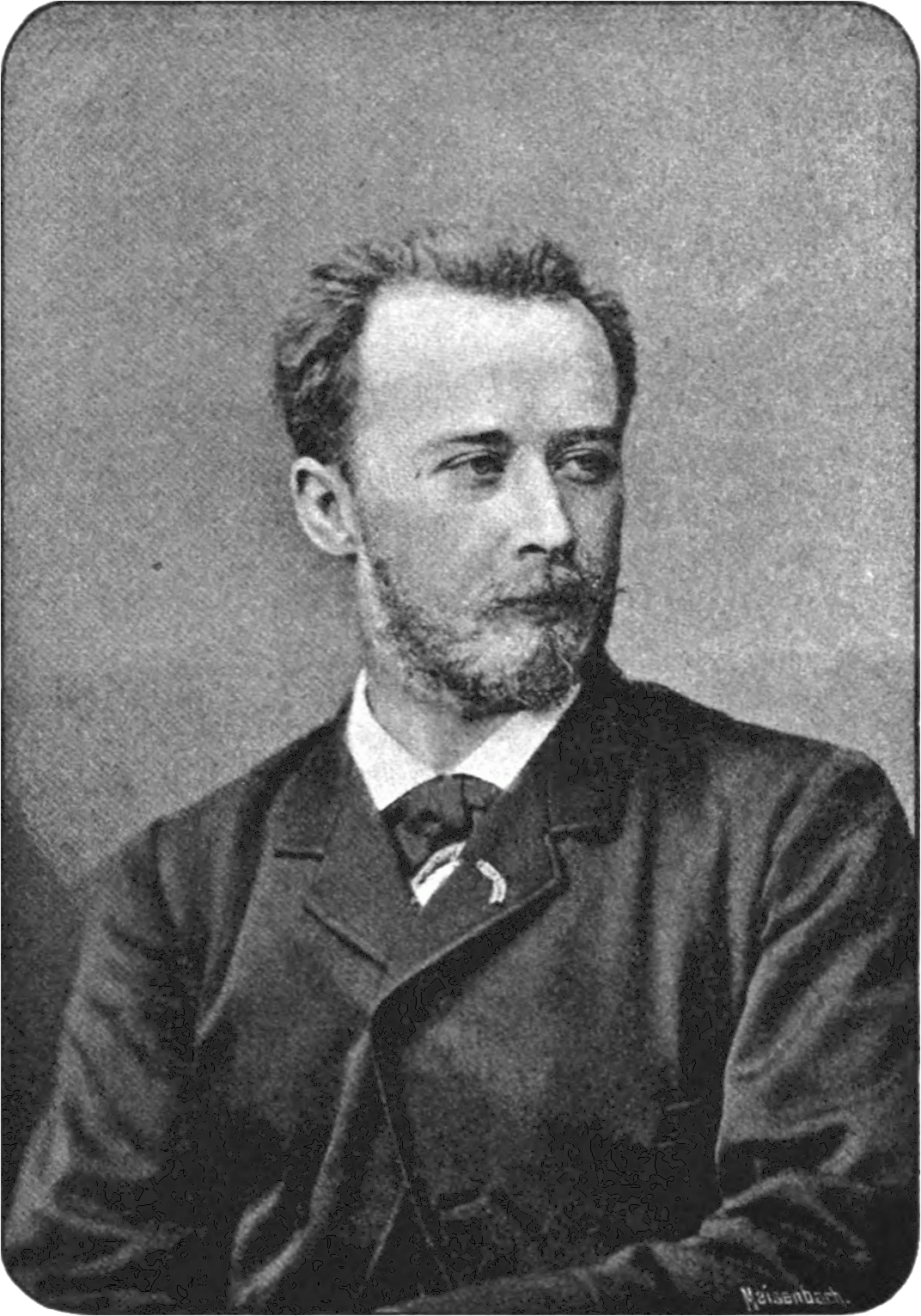 Vlaho Bukovac (1855–1922), Croatian painter